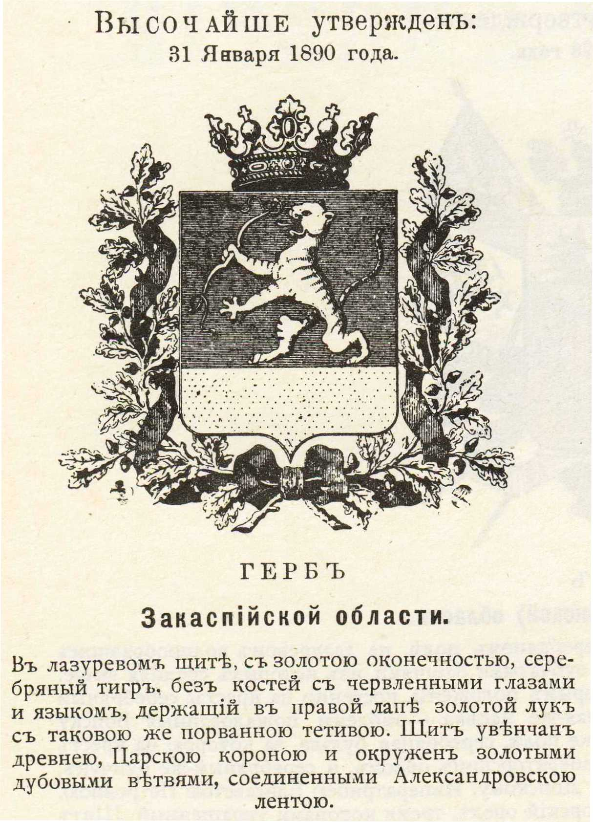 Official Russian Empire coat of arms Zakaspii Oblast. Герб Российской Империи Закаспийской области с официальным описанием в Гербовнике Винклера.